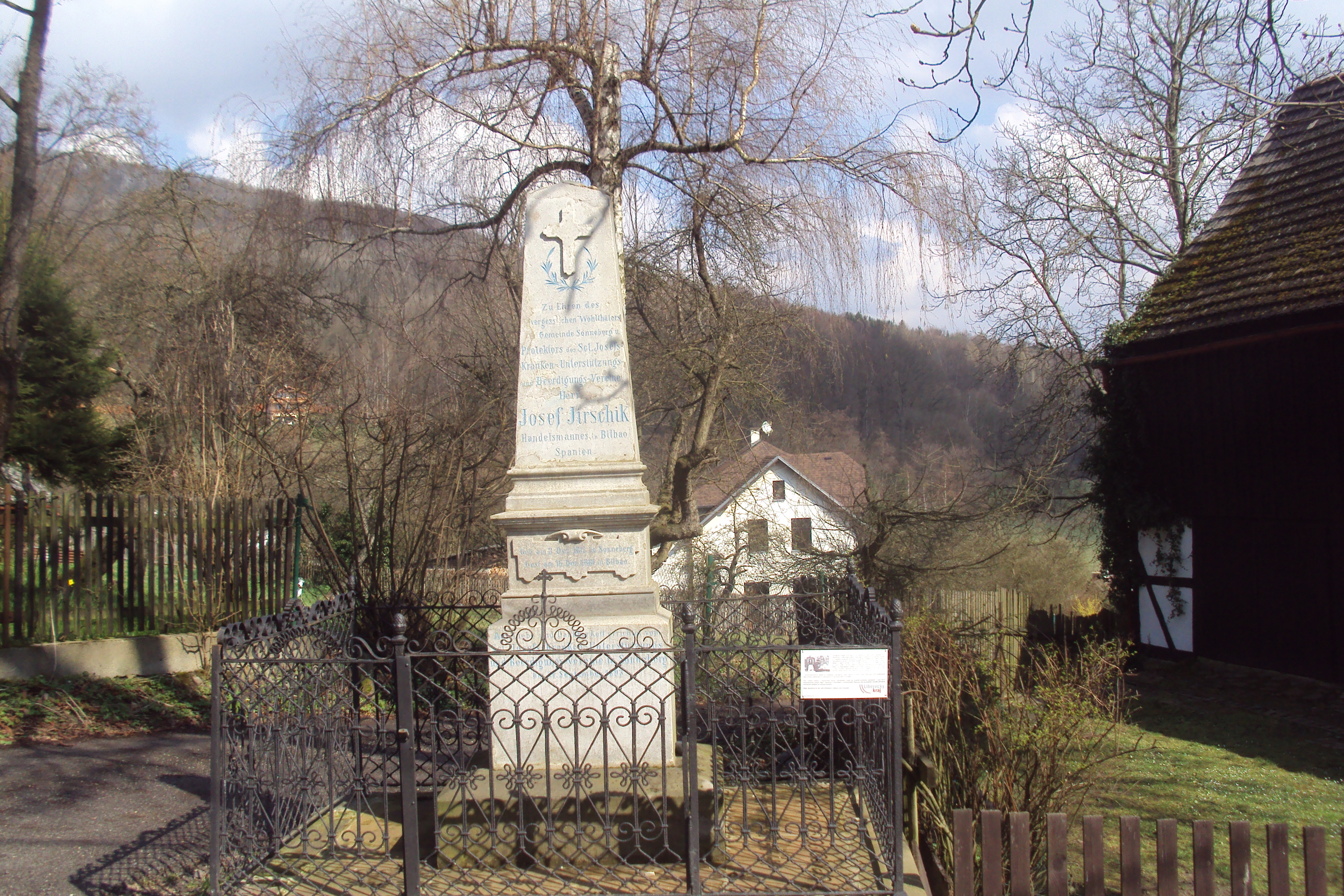 Pomník rodákovi obce Slunečná na Českolipsku